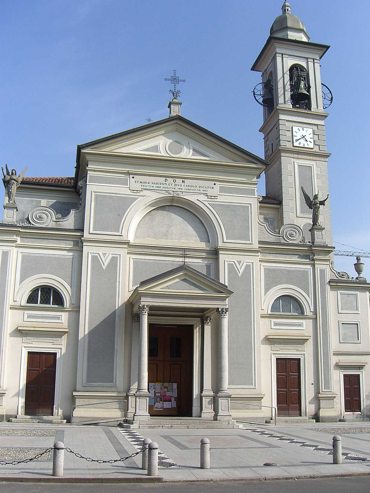 MB Brugherio - frazione San Damiano - facciata della chiesa dedicata a Santa Maria Nascente e a San Carlo eretta nel 1868, ornata nel 1913 e completata nel 1927